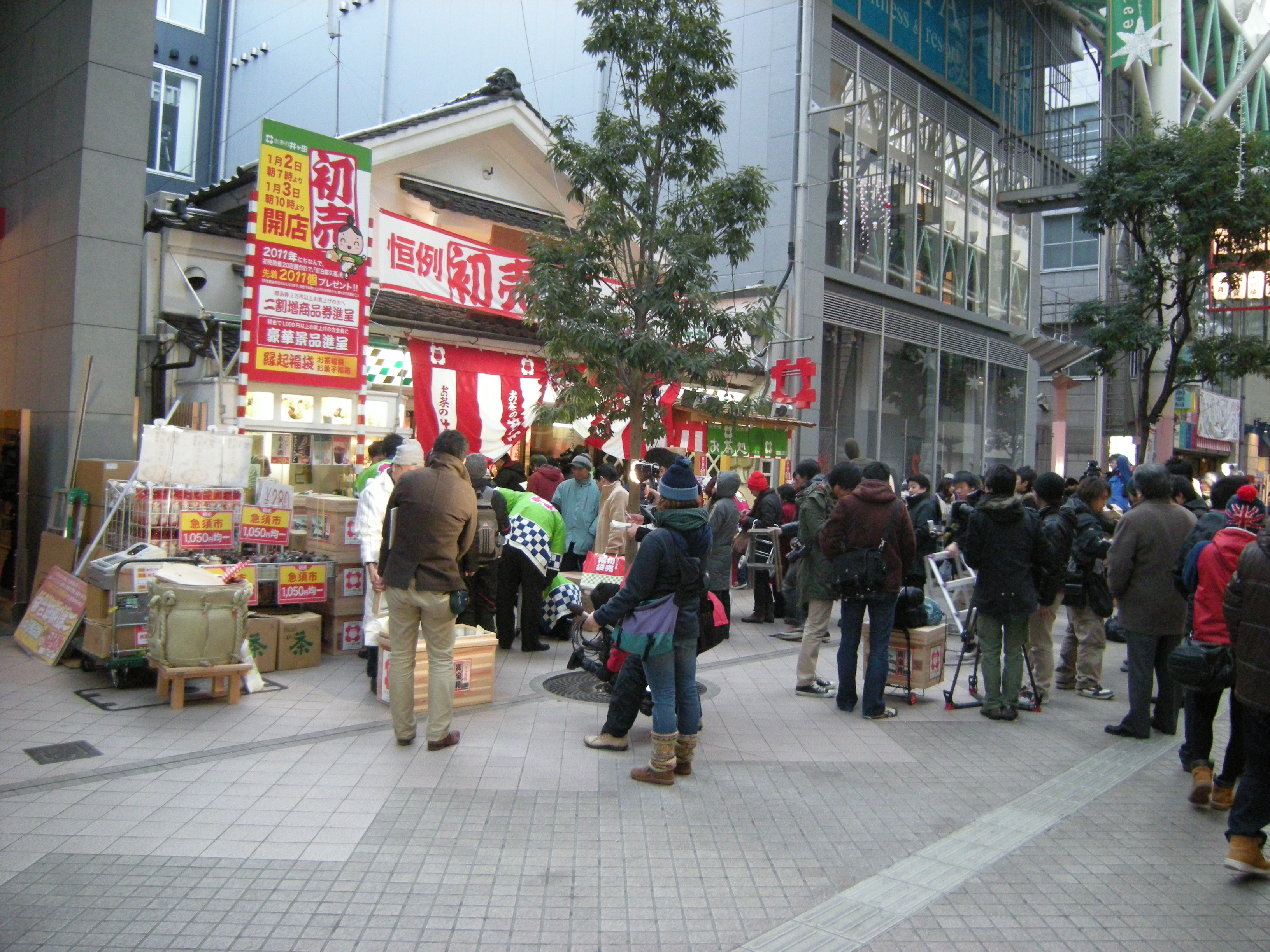 仙台初売りの店頭での典型的な様子。市街中心部にある老舗のお茶屋さんの初日1月2日開店直後の状態。客の列が右側に伸びている。先着何人かの客には、縁起物のお茶箱が渡され、それには品物が詰めあわされていて福袋と同等の役割を果たしている。左端の白い服装の人物は一番乗りの客で、大きなお茶箱を開けて地元TV局の取材を受けている。